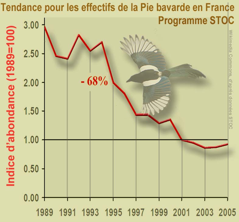 Indice de régression globale (malgré augmentation dans les villes) des populations d’oiseaux communs, pour la pie bavarde (Pica pica), selon le Programme STOC